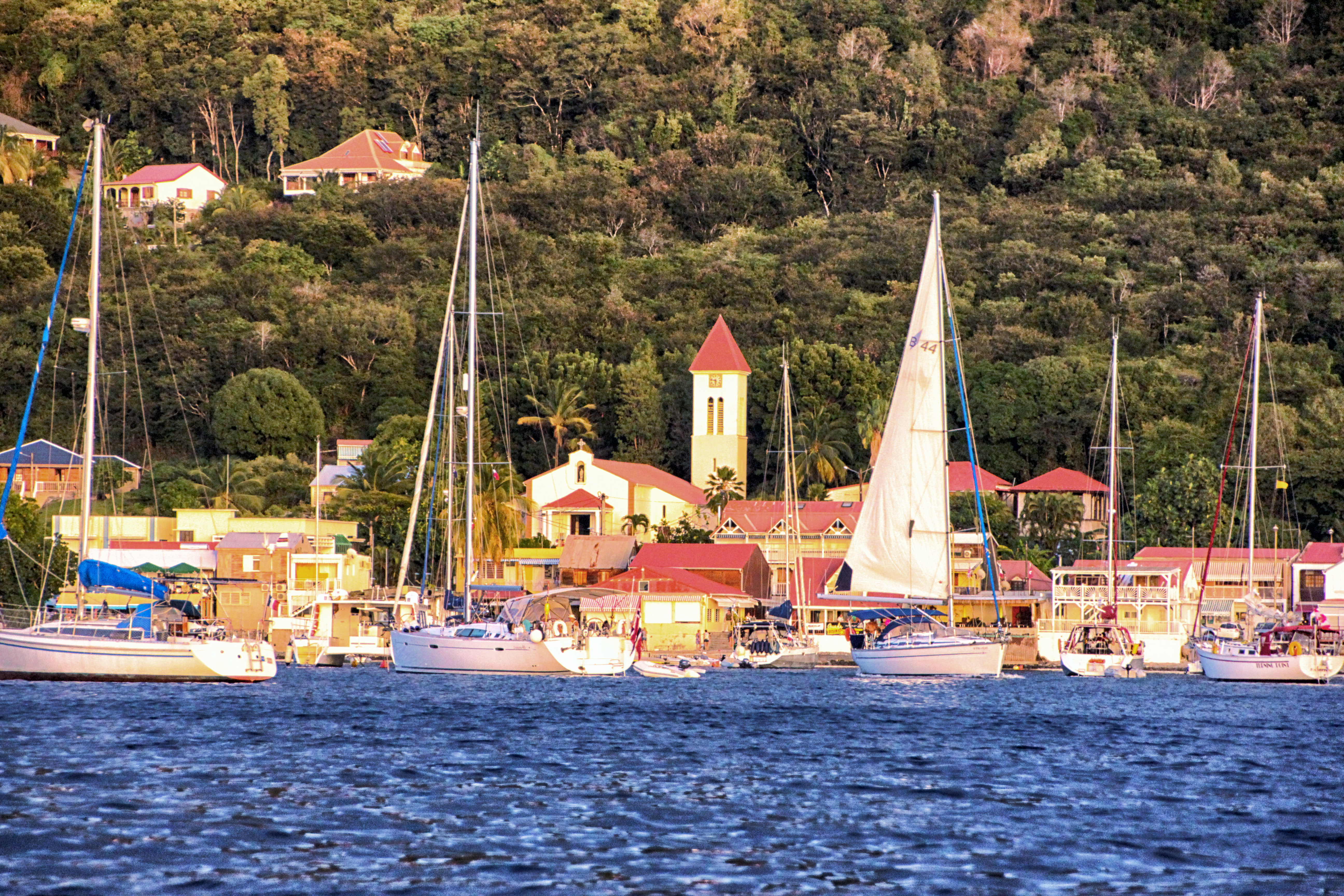 Une balade bateau au départ de Deshaies